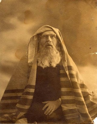 Shakespeare, William: A velencei kalmár. Társulat: Nemzeti Színház, Budapest. Bemutató: 1923.04.06. Rendező: Csathó Kálmán. Szereplők: Tubal: Bartos Gyula.